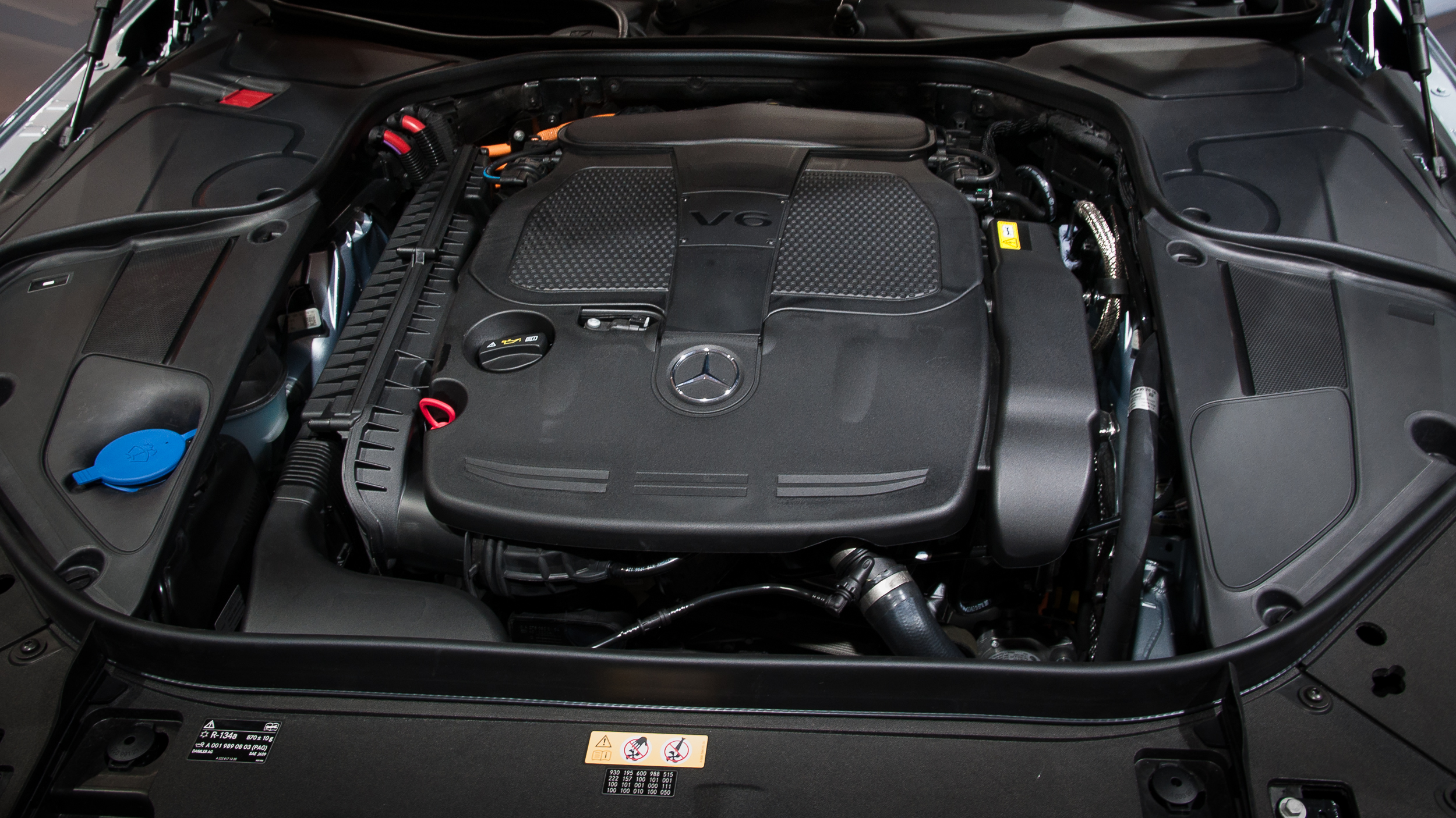 Mercedes-Benz Motor 276.9 im Typ S 400 Hybrid, BR 222